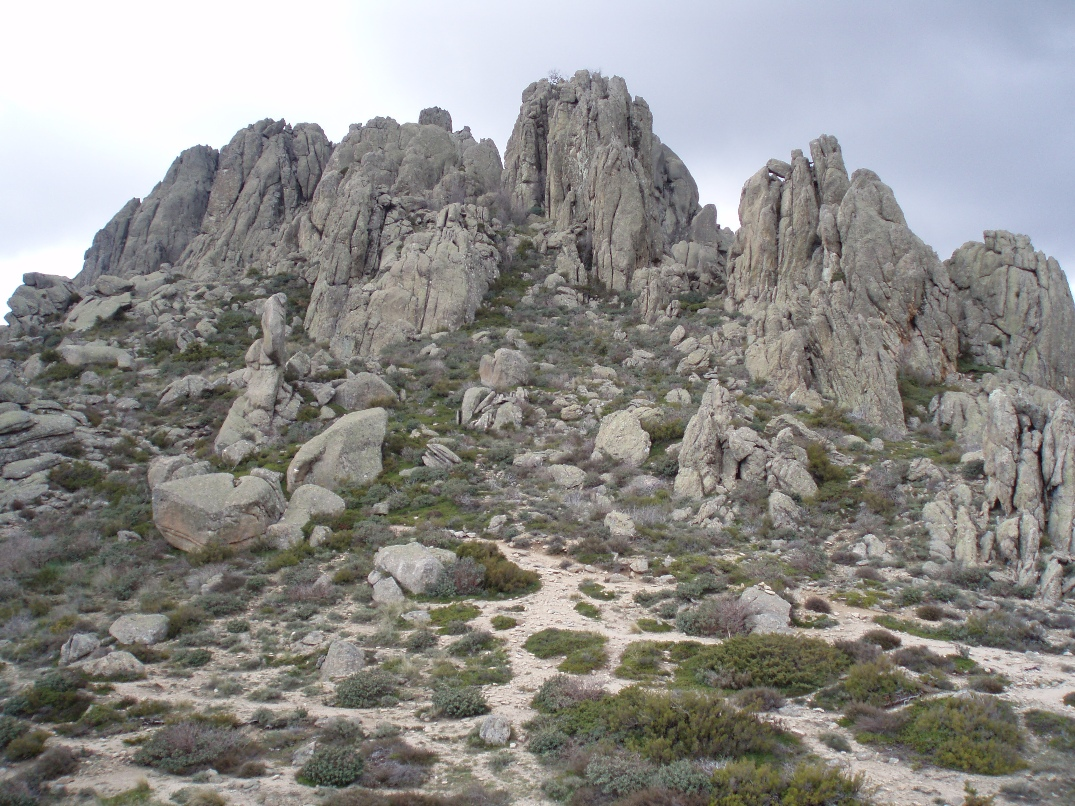 Riscos de la Pedriza Anterior (Comunidad de Madrid, España).